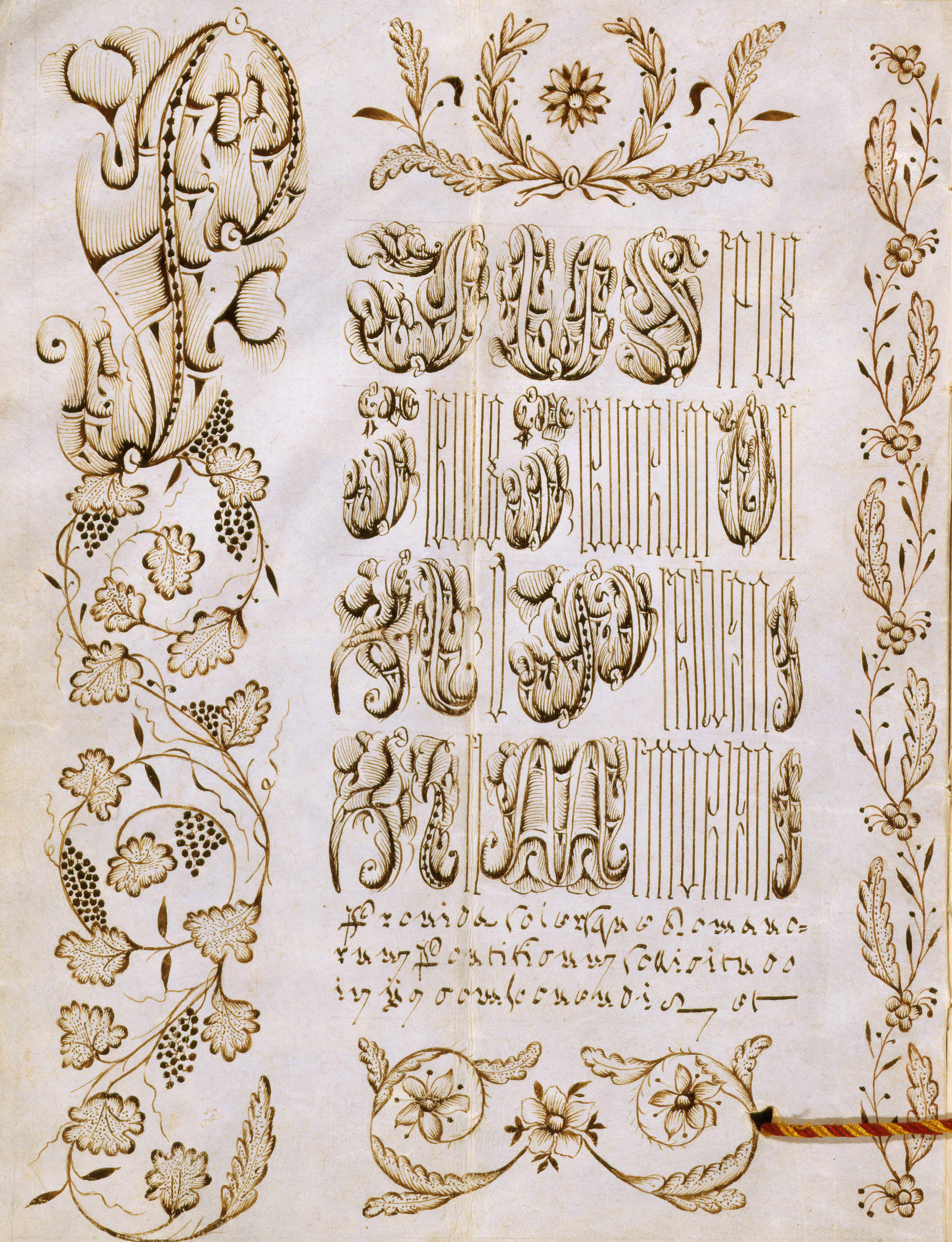 Zirkumskriptionsbulle Provida solersque, 1821 (HStAS E 100 Nr. 489)